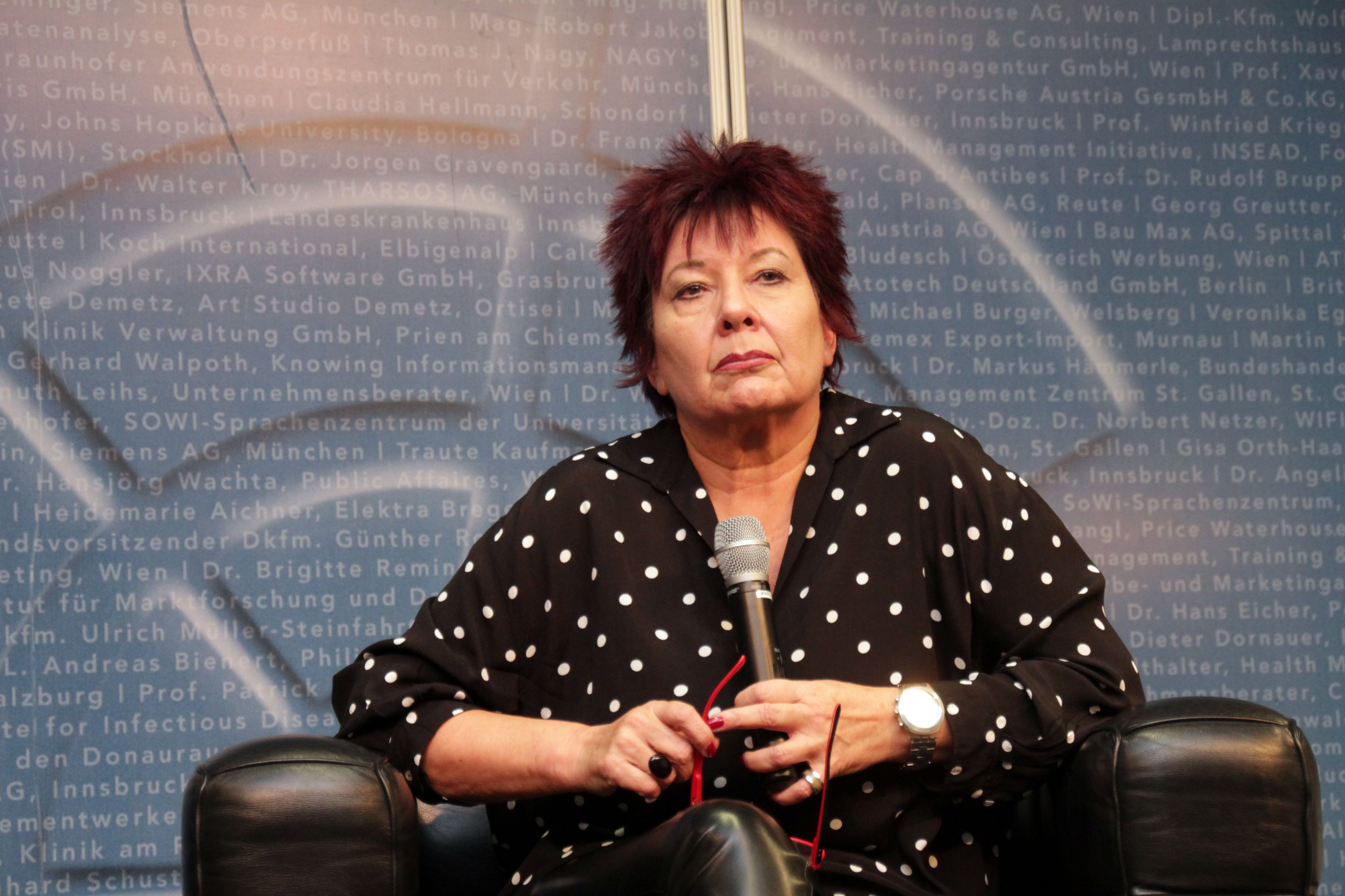 Helga Konrad IMG_4610